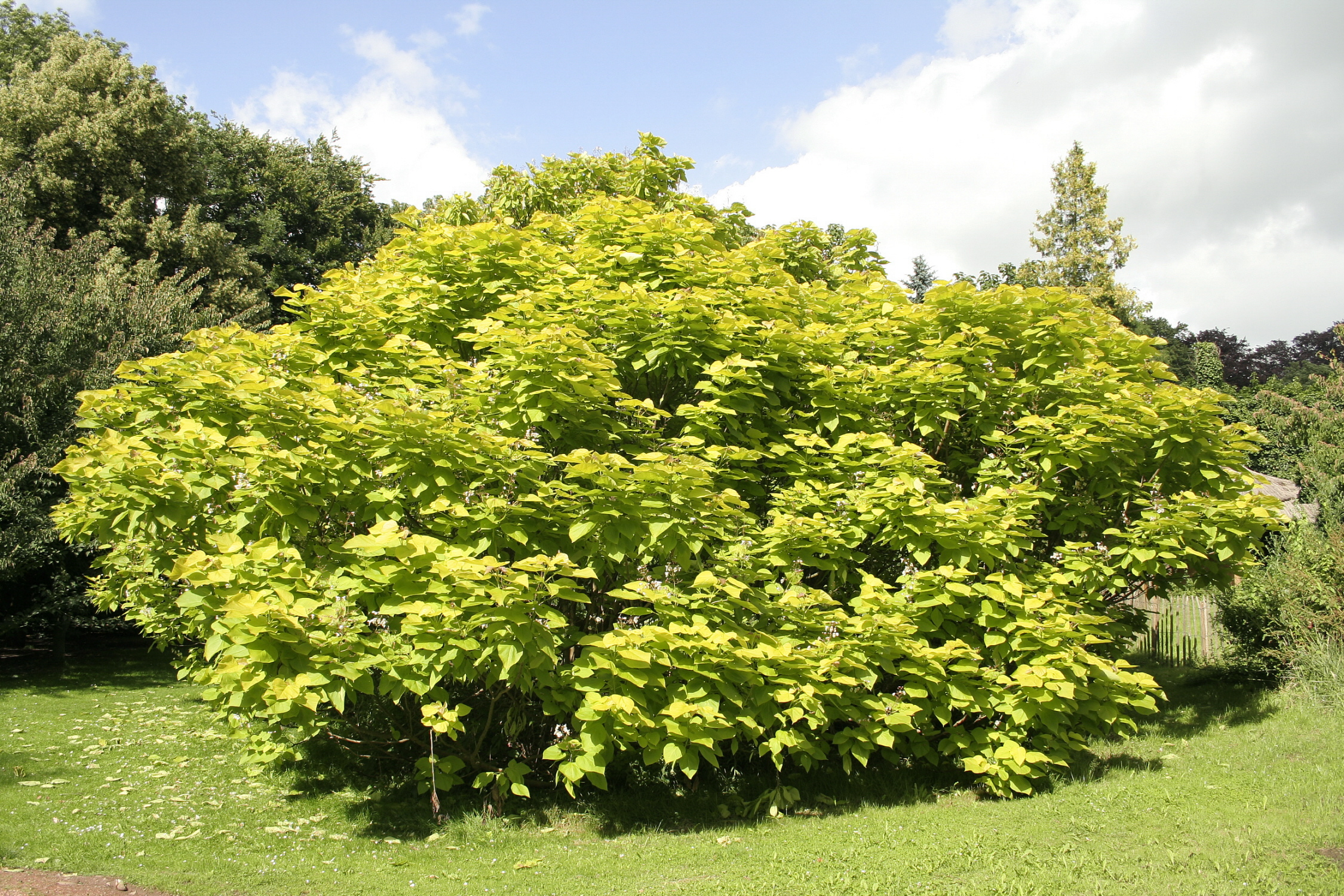 Catalpa bignonioides ‘Aurea’. Circonférence en cm mesurée à 1m50 du sol: 86 cm (2005) Hauteur : 8 m (2005) Position exacte : Morlanwelz-Mariemont (Belgique) – Parc du domaine de Mariemont.